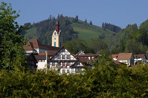 Sattel (Nr. 03.1-4596)